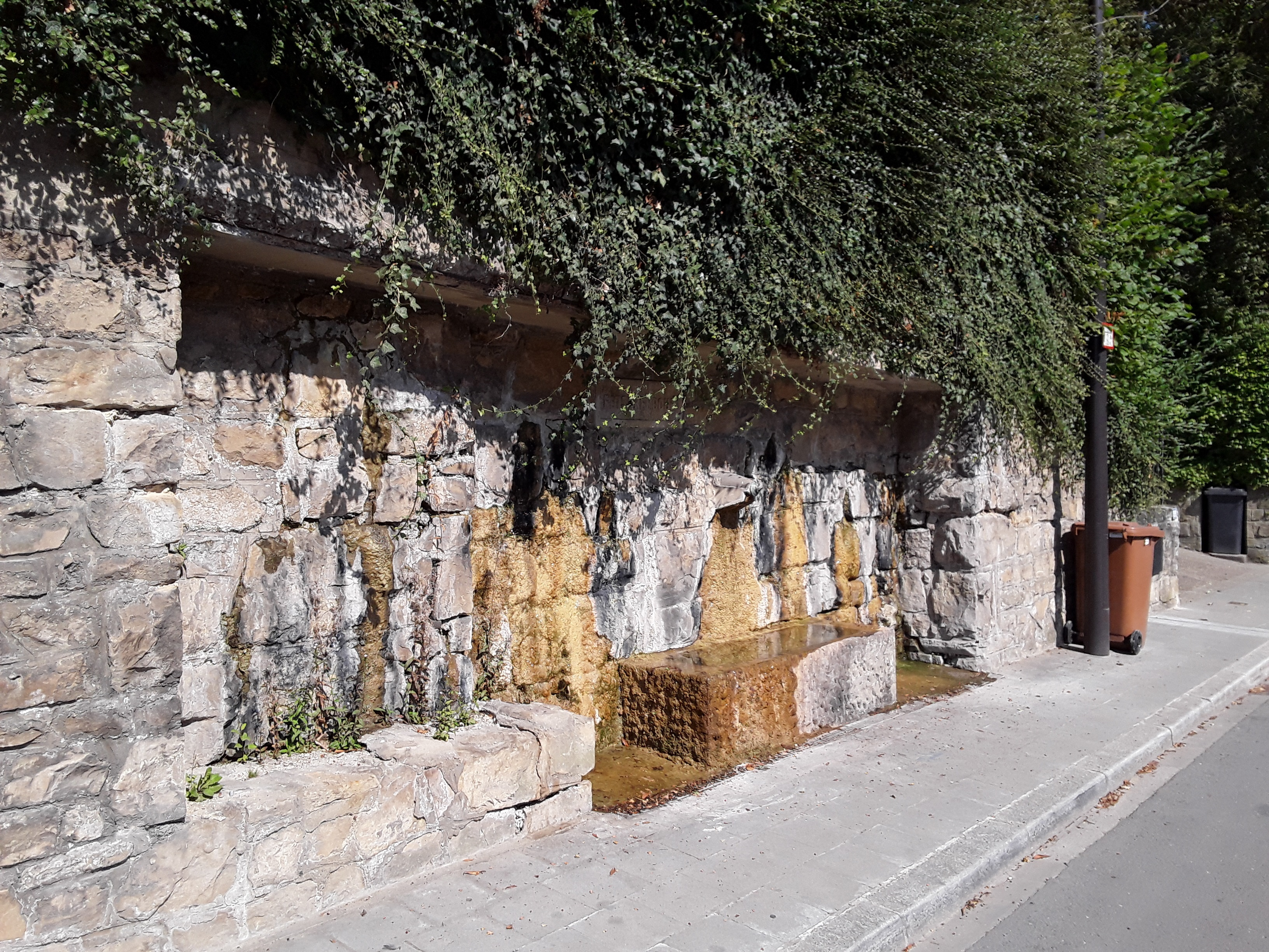 Fontaine "Fetschebur" (Fetschenbour) à la rue des Pommiers à Luxembourg, Cents